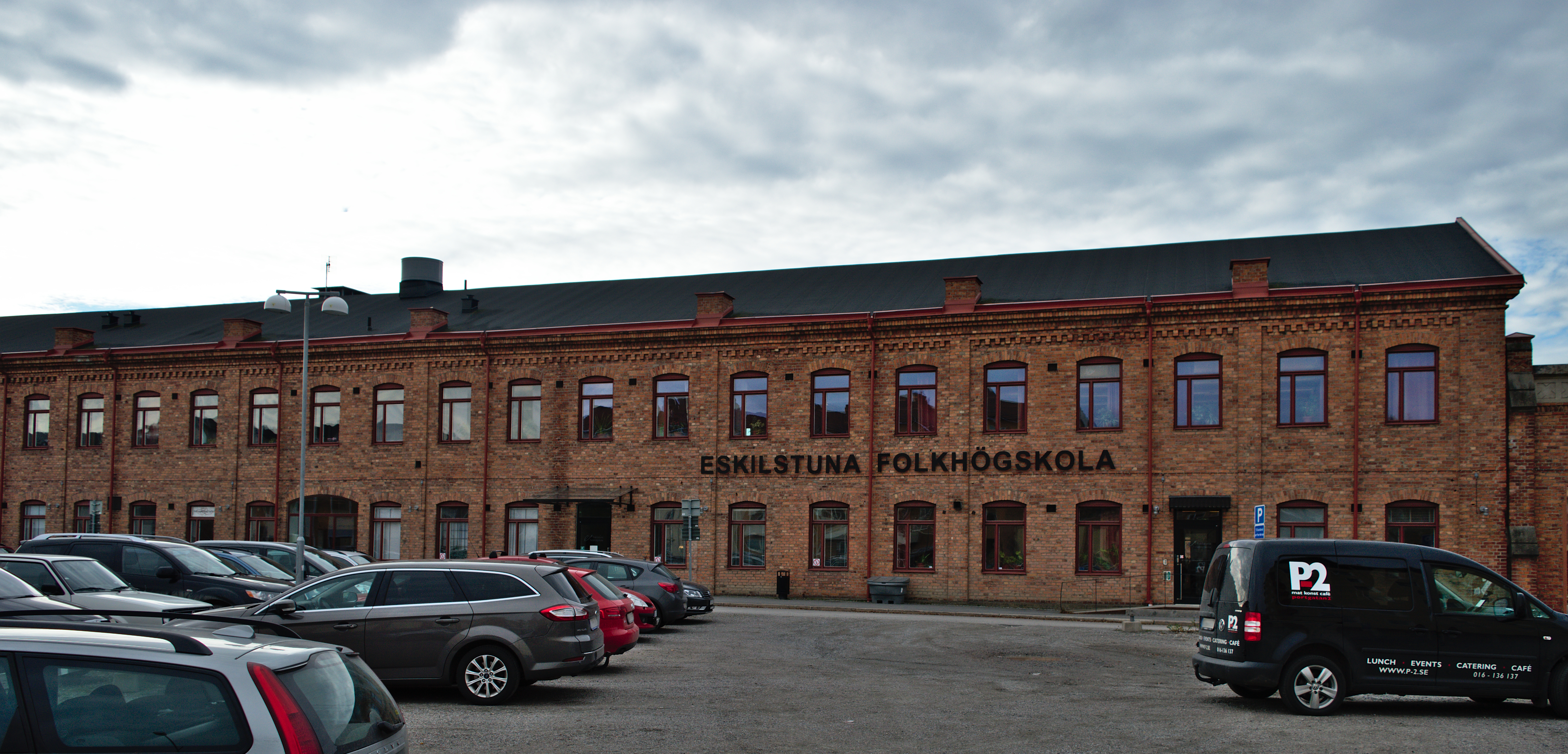 Eskilstuna folkhögskola i Munktellområdet i Eskilstuna.